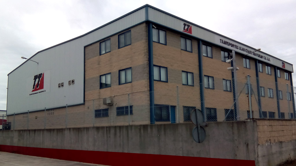 Sede de TT en Narón, A Coruña